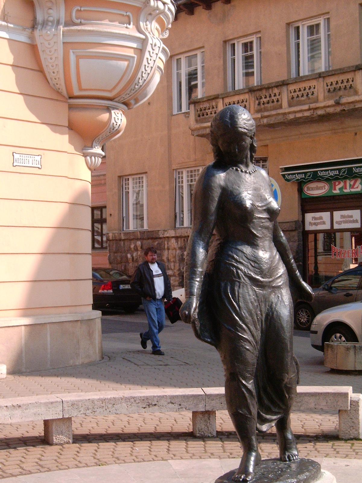 Medgyessy Ferenc (1881-1958): Táncosnő, Székesfehérvár, Kossuth utca. A szobor eredetije 1954-ben készült, a budapesti Madách téren található. A fehárvári példányt 1984-ben avatták fel, miután a művész özvegye a városnak ajándékozta.